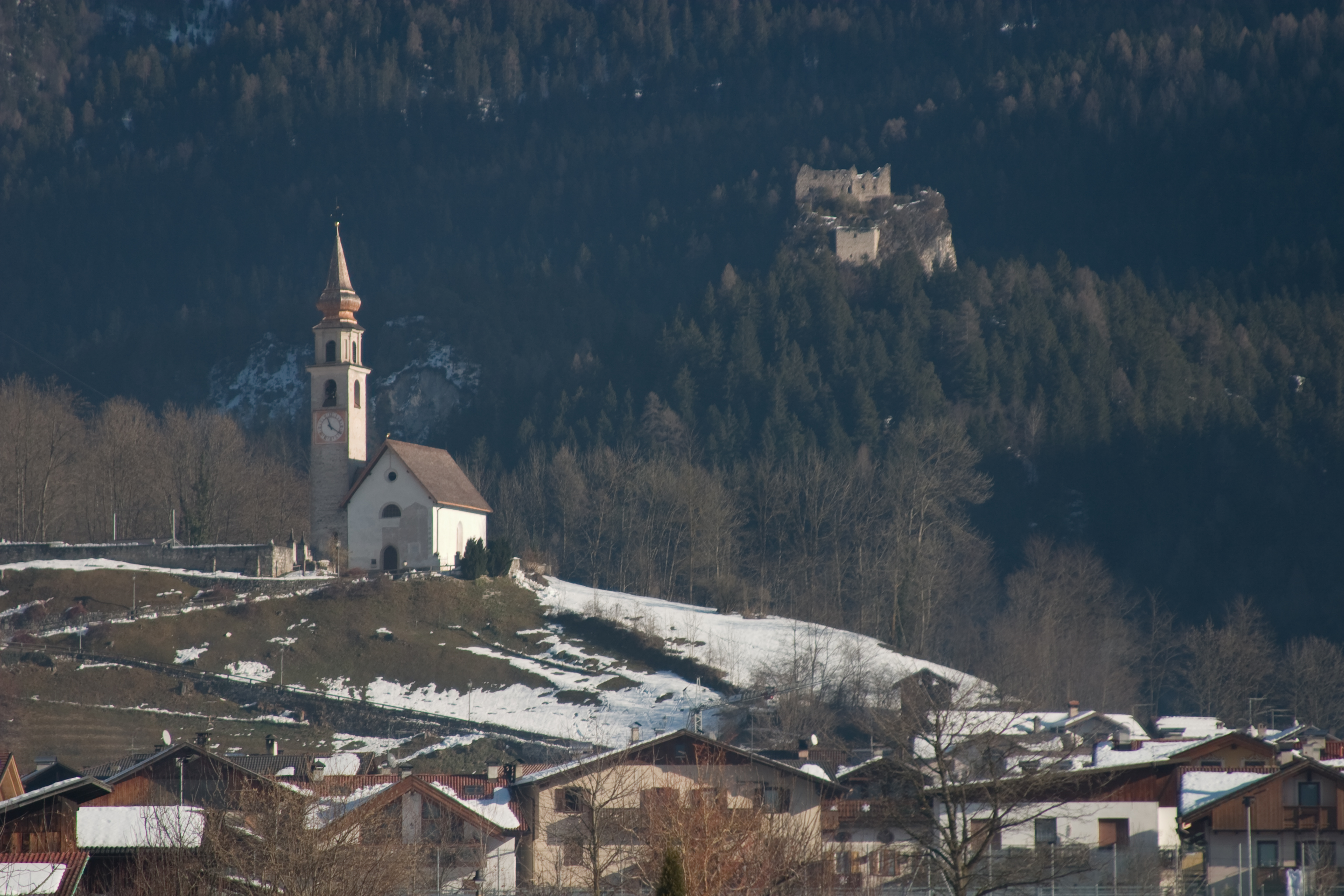 Tonadico